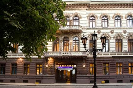 гостиница "Лондонская", г. Одесса, Украина